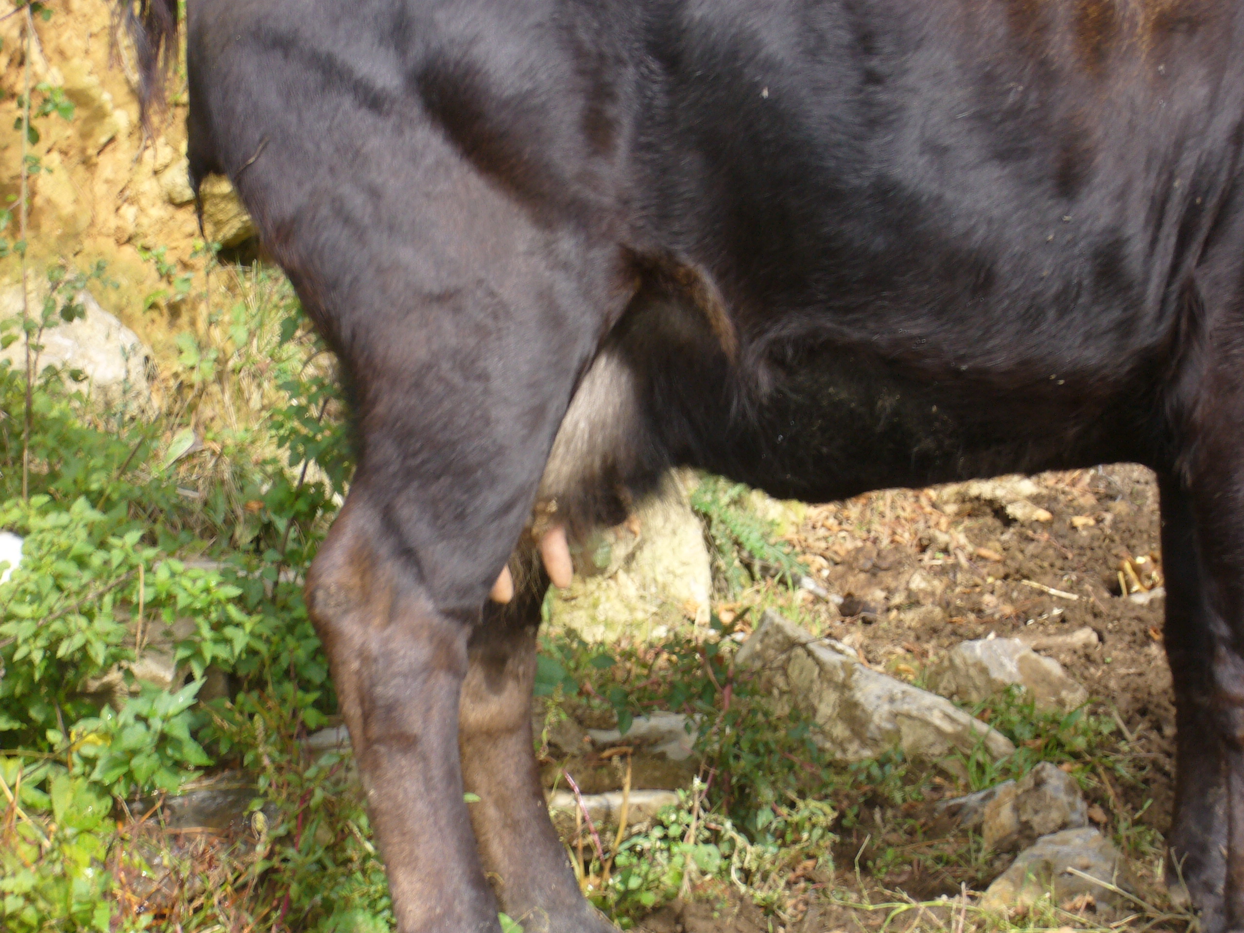 Behi terreña baten errapea